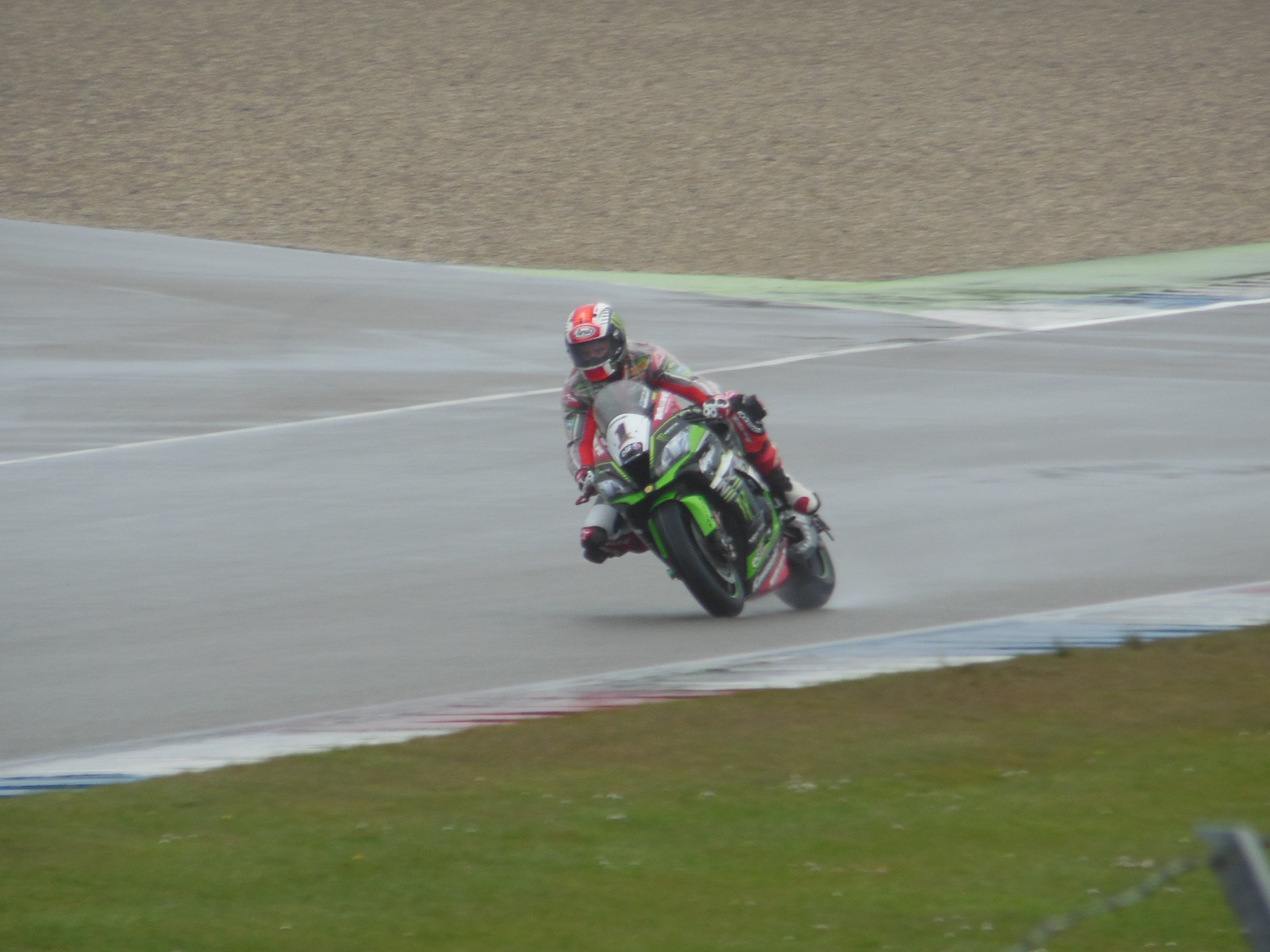 Das Foto hab ich bei der Superbike am 15.04.16 WM in Assen aufgenommen.